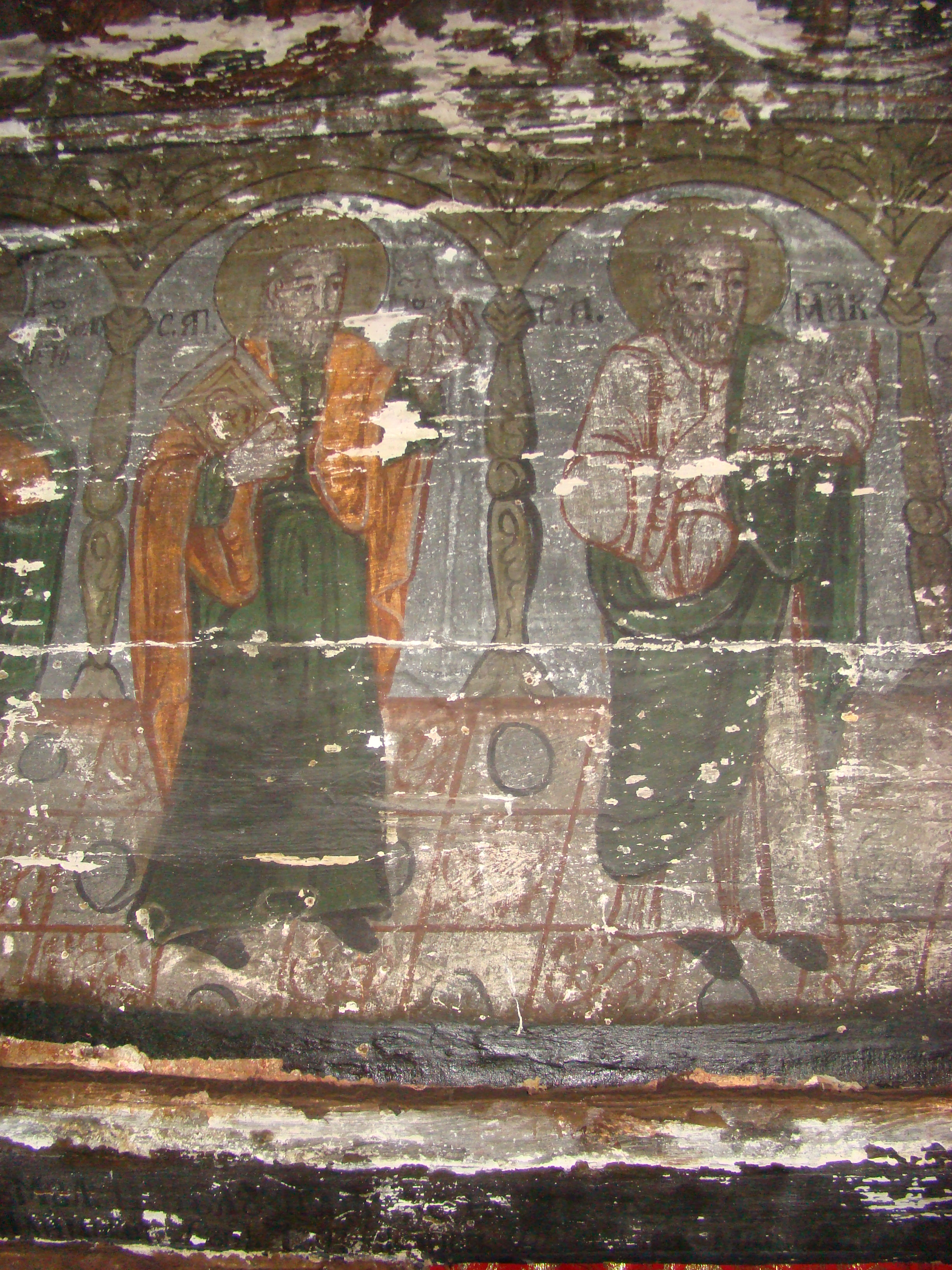 Biserica de lemn "Adormirea Maicii Domnului" a mănăstirii Bic, strămutată din satul Stâna